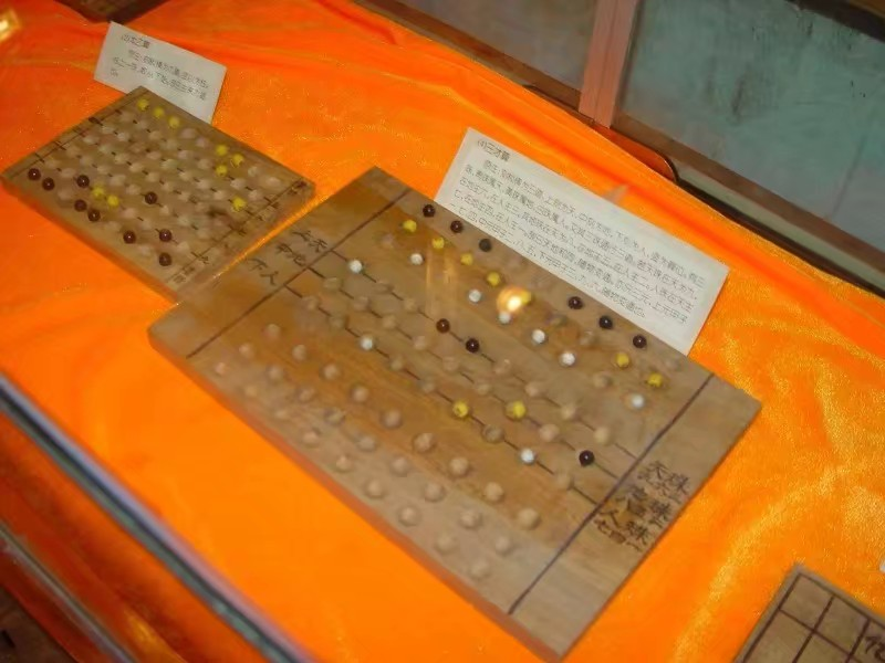 中文（中国大陆）: 临海国华博物馆收藏的三才算